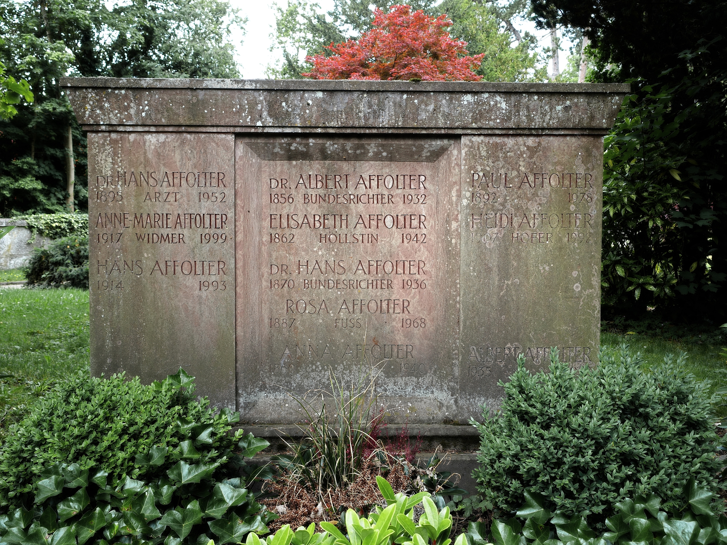 Albert Affolter-Höllstin (1856–1932) und Hans Affolter-Fuss (1870-1936) Jurist, Politiker Bundesrichter. Familien Grab. Friedhof St. Katharinen, Solothurn.